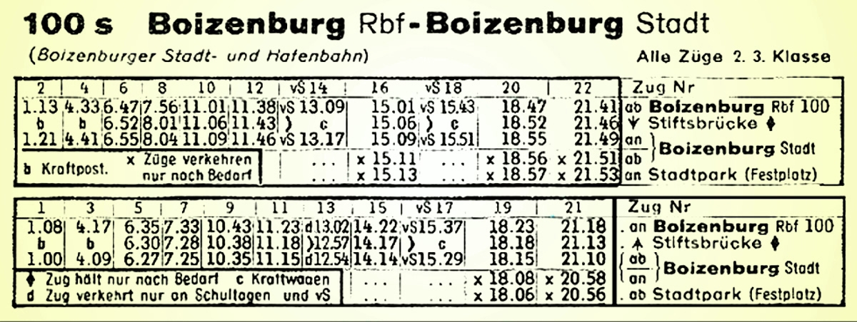 Sommerfahrplan der Stadtbahn in den 1930er Jahren.